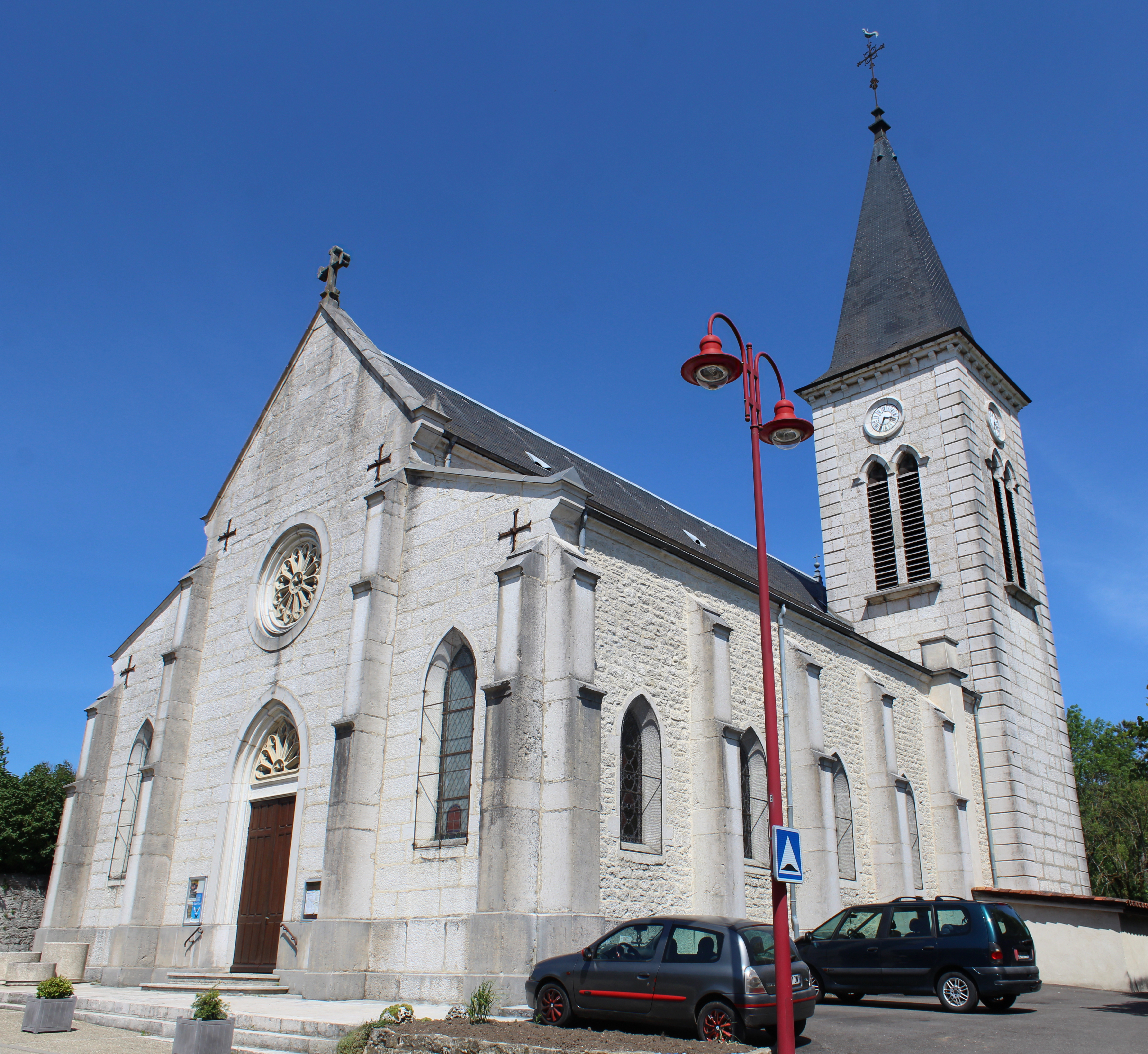 Église Saint-Antoine de Simandre-sur-Suran.